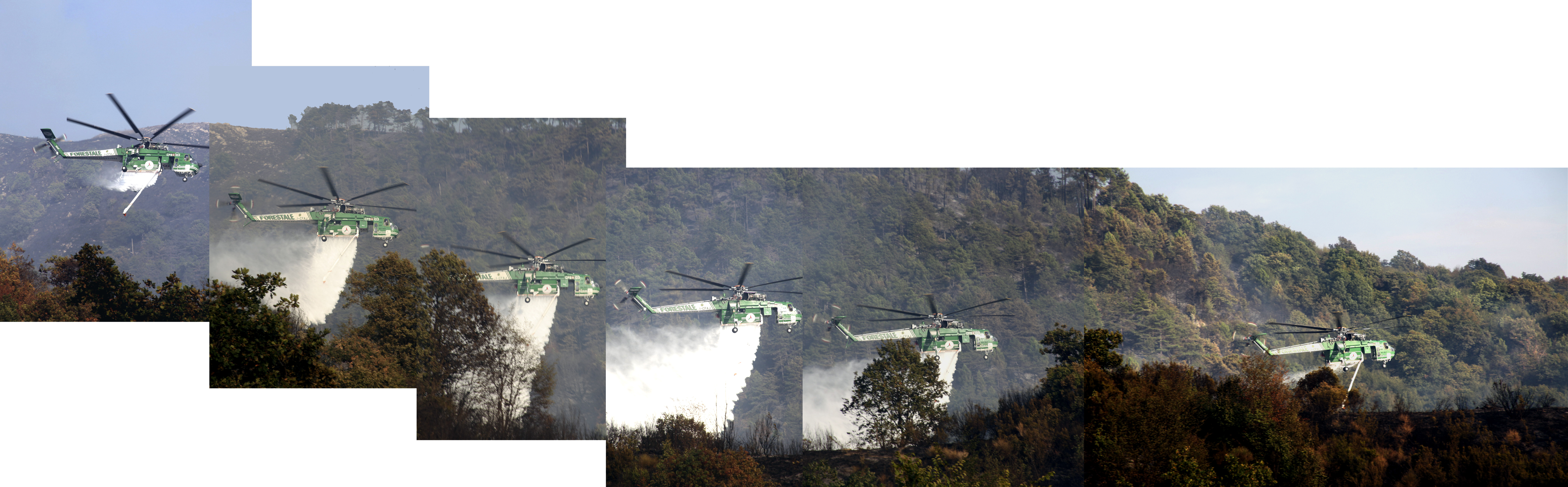 Sequenza di sgancio acqua da parte di un'Erickson S-64F durante l'incendio sulle alture alle spalle di Genova a Quarto dei Mille (costa Stelletta) il 07/09/09